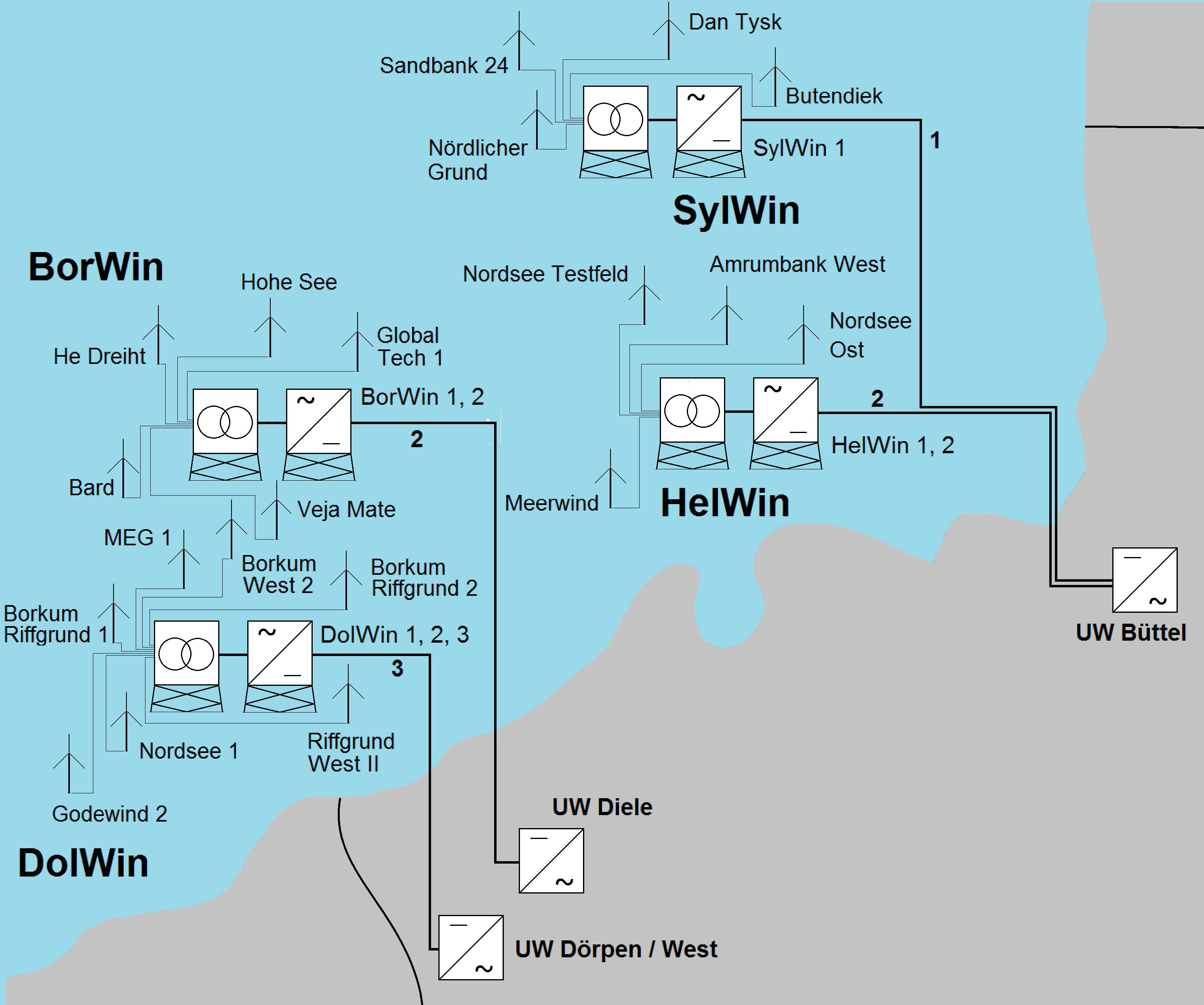 HGÜ Offshoreplattformen für Windparks in der Nordsee